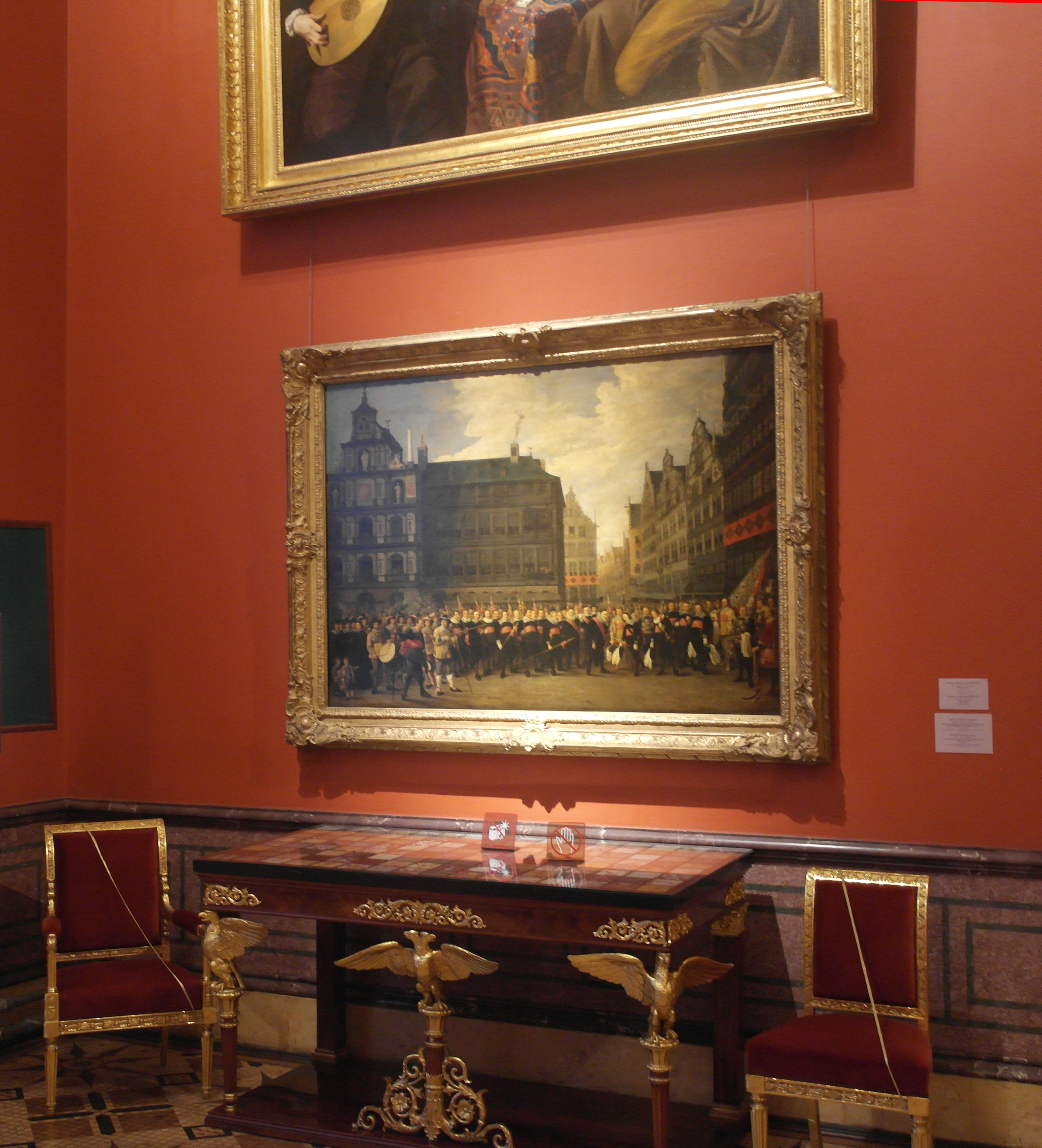 Новый Эрмитаж, зал 245 - Картина Тенирса "Групповой портрет членов стрелковой гильдии «Oude Voetboog» («Старый Арбалет») в Антверпене"